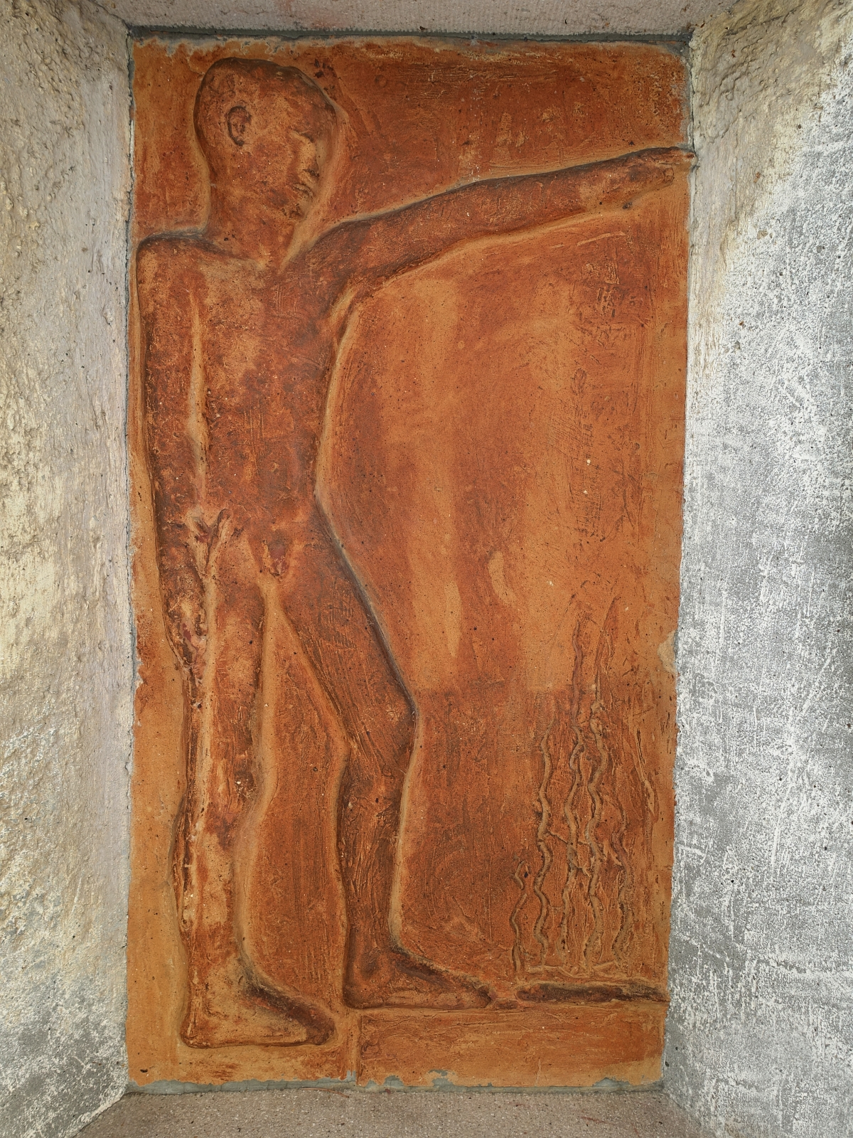 Friedhof Sissach, Brunnen, Terrakotta Relief von 1919 oder 1924 von Jakob Probst (1880–1966), Bildhauer